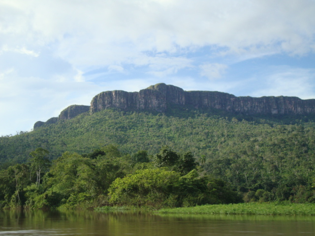 Parque nacional Parima-Tapirapeco